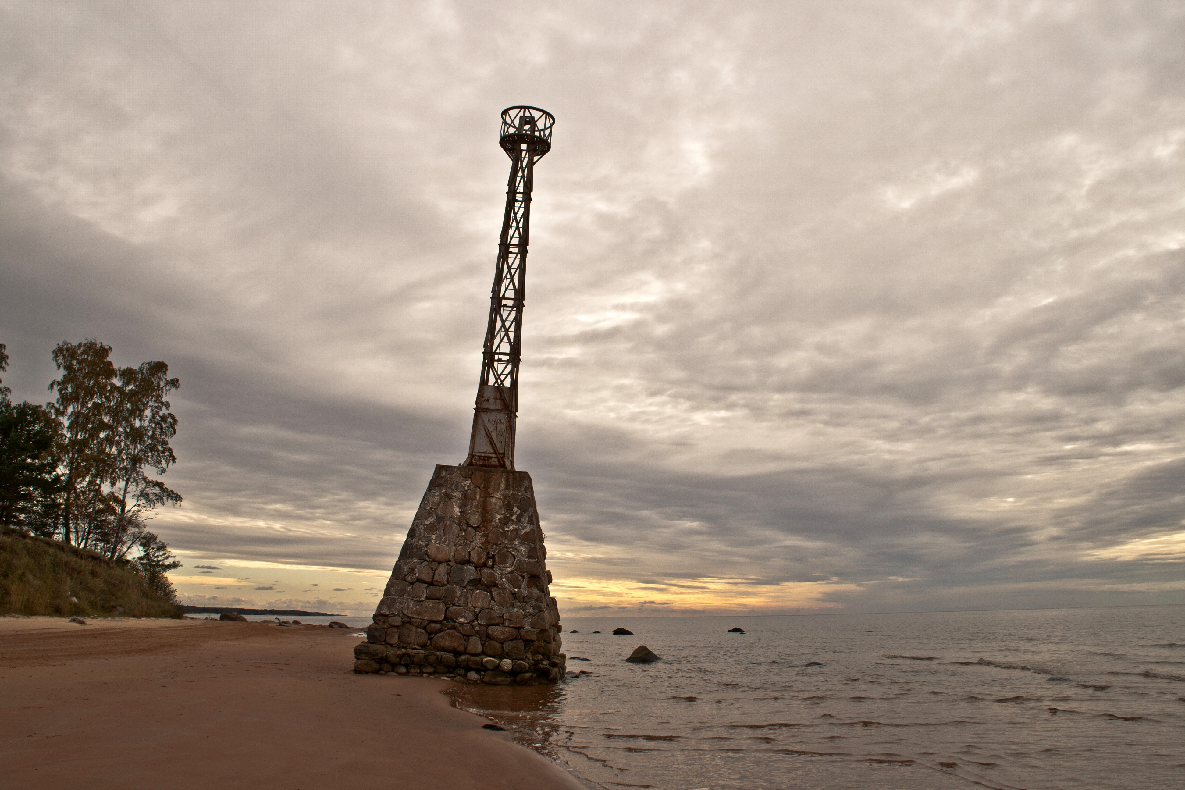 Ķurmraga bāka